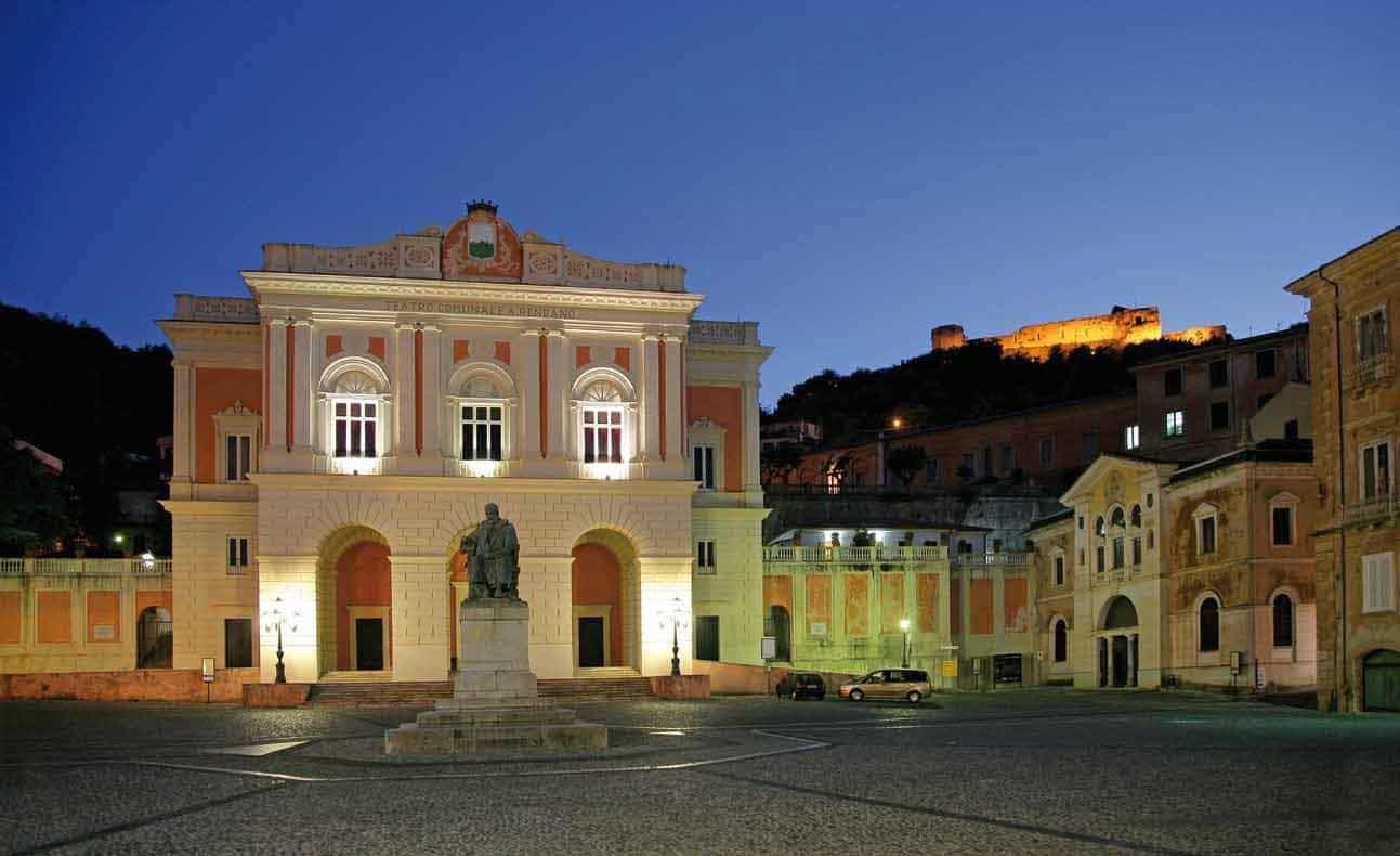 Prospetto frontale Teatro Rendano in Piazza XV Marzo a Cosenza